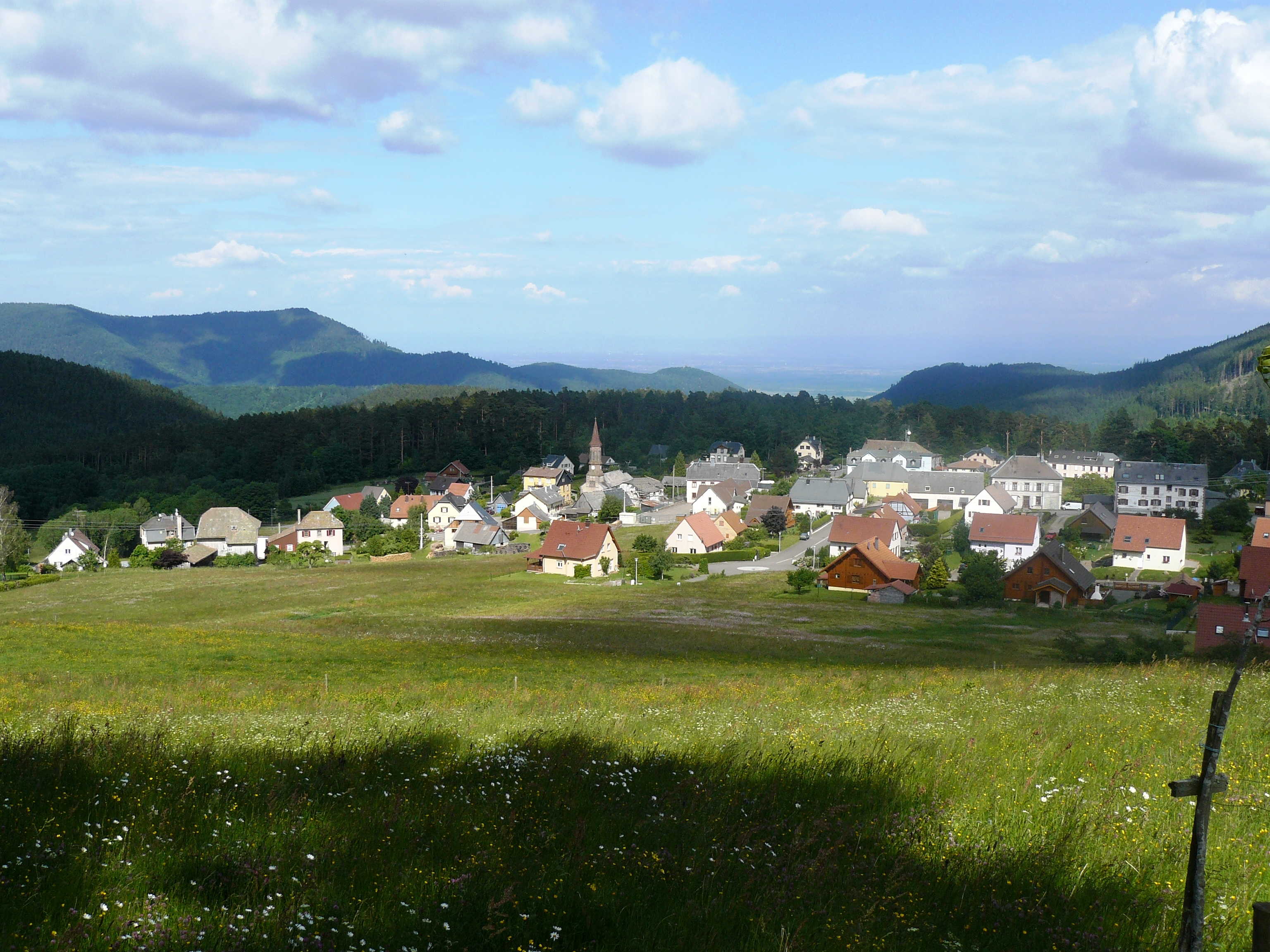 Vue sur le village d'Aubure